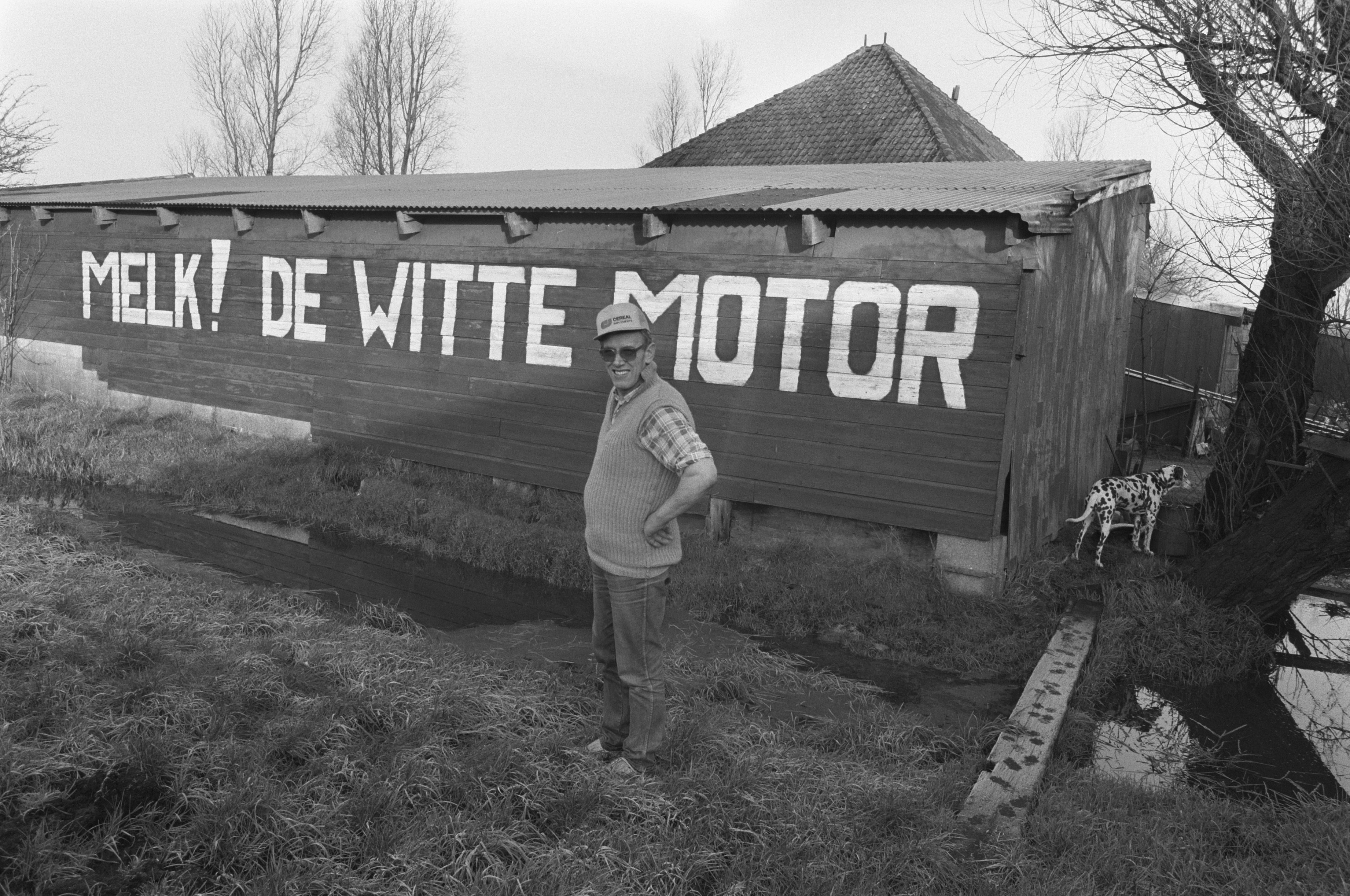 Collectie / Archief : Fotocollectie Anefo Reportage / Serie : [ onbekend ] Beschrijving : Boer Roeleveld uit Averkerk voor zijn schuur met tekst "Melk, de witte motor", die eraf moet van de Provincie Noord-Holland Datum : 18 januari 1989 Locatie : Averkerk, Noord-Holland Trefwoorden : boeren, leuzen, schuren Fotograaf : Bogaerts, Rob / Anefo Auteursrechthebbende : Nationaal Archief Materiaalsoort : Negatief (zwart/wit) Nummer archiefinventaris : bekijk toegang 2.24.01.05 Bestanddeelnummer : 934-3889